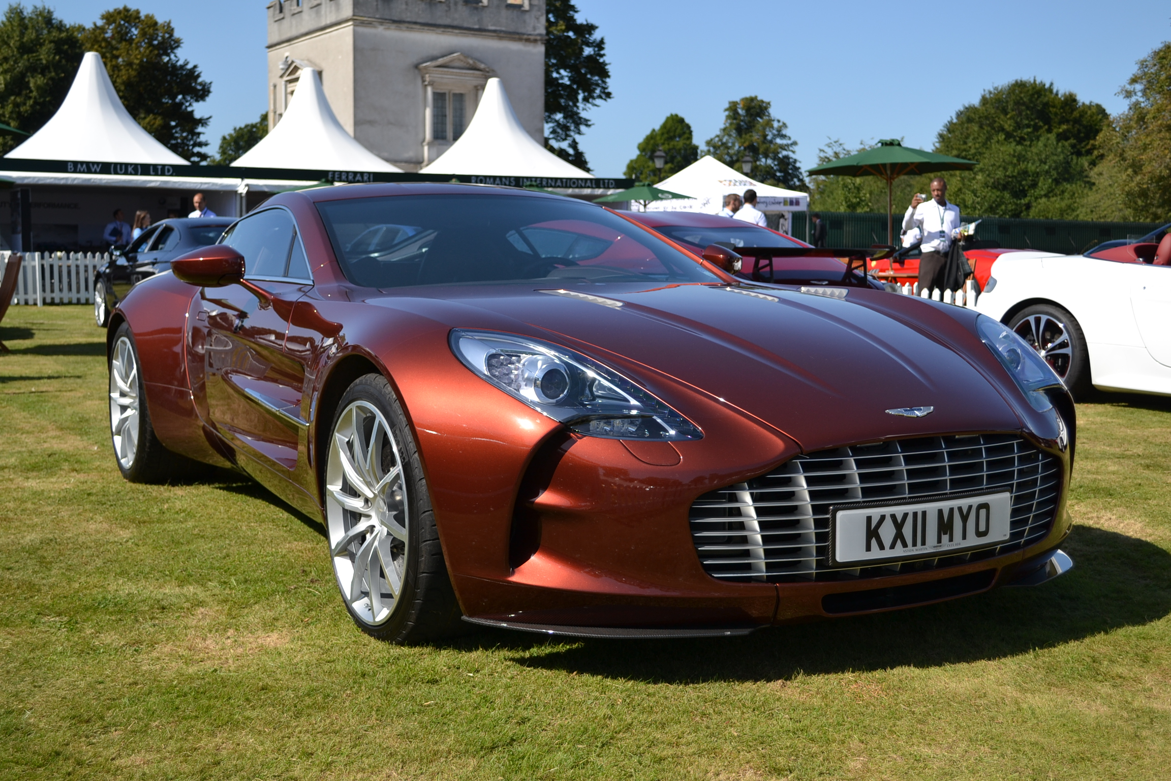 Salon Privé London 2012